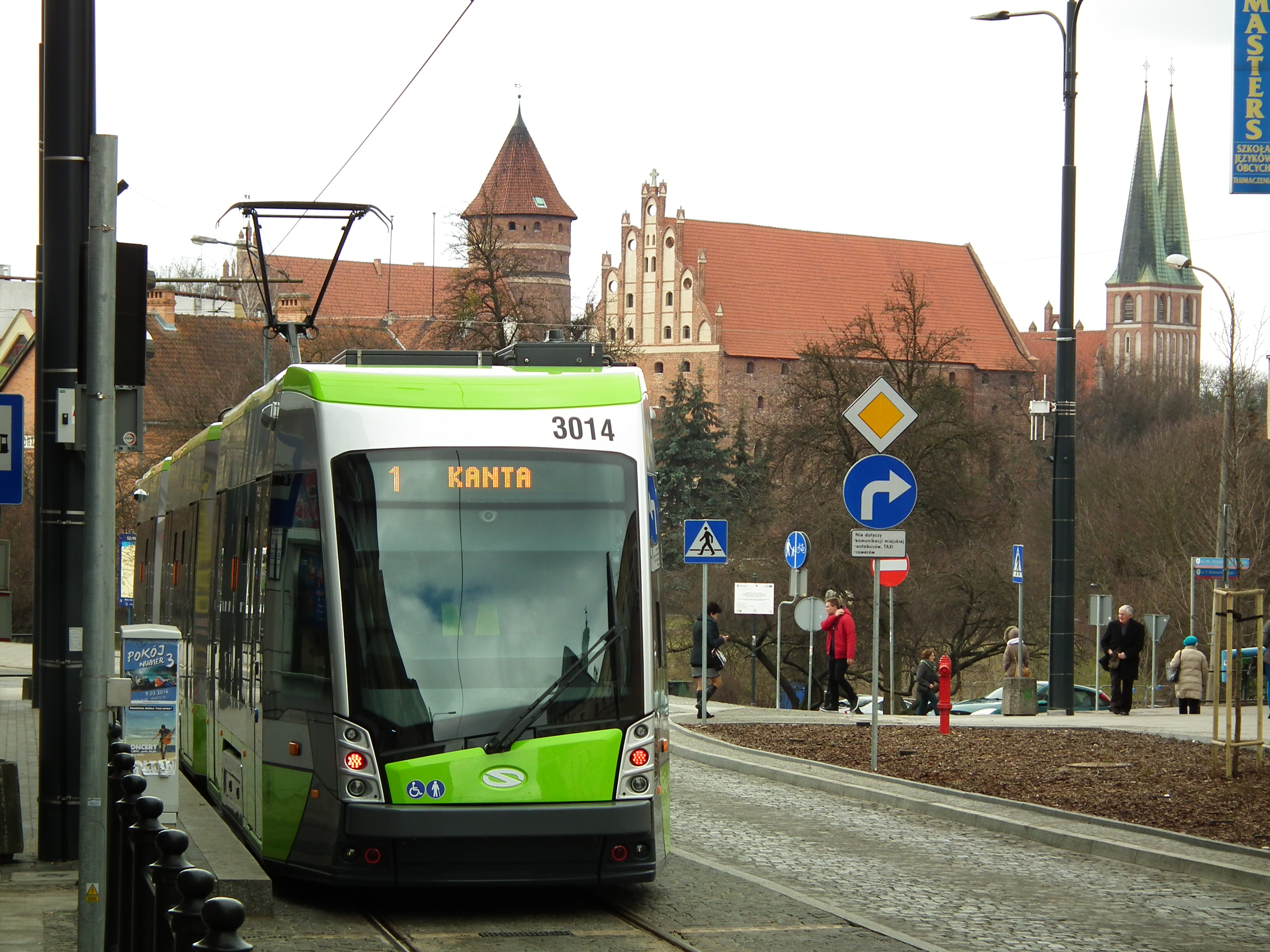 Tramwaje olsztyńskie A.D. 2016.